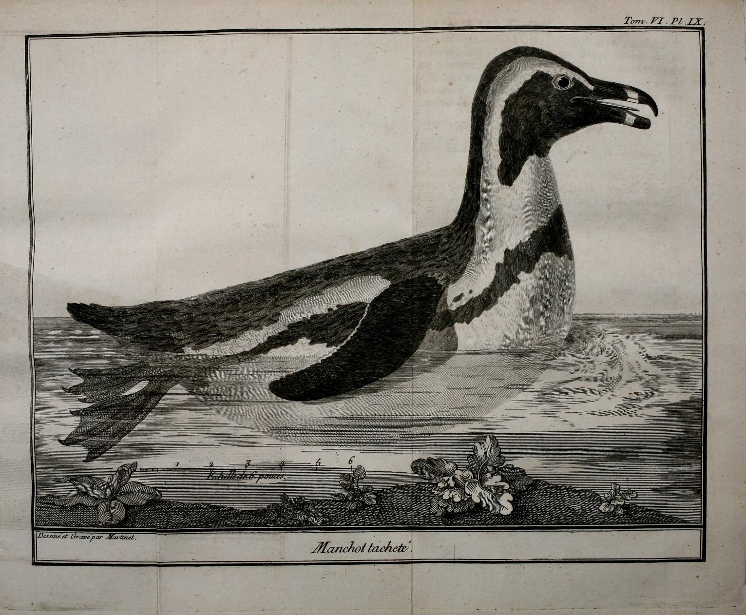 Illustration du Manchot tacheté (Spheniscus demersus) dans Ornithologie, Brisson 1760.